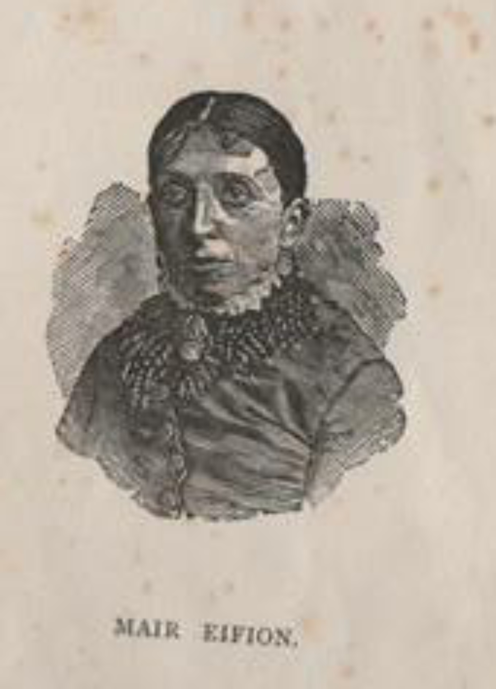 Mary Davies Mair Eifion (1846 -1882)